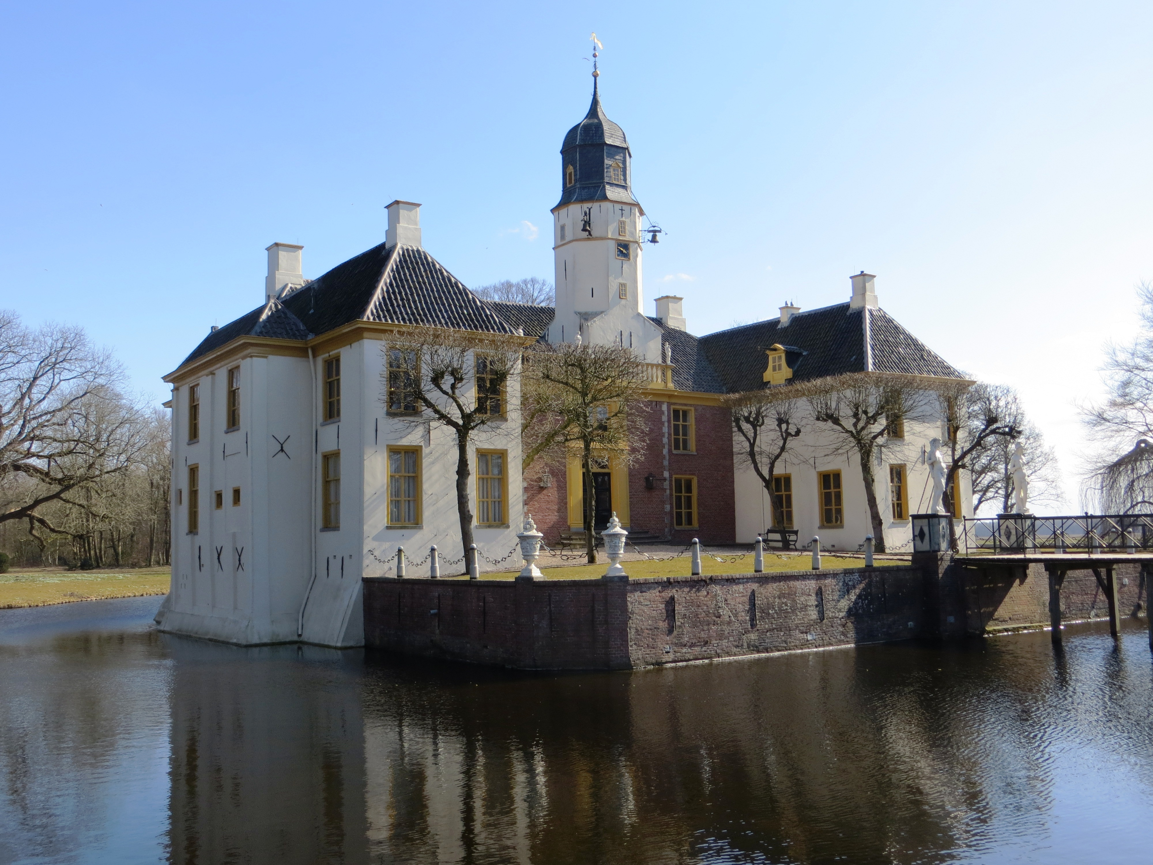 Fraeylemaborg - Slochteren